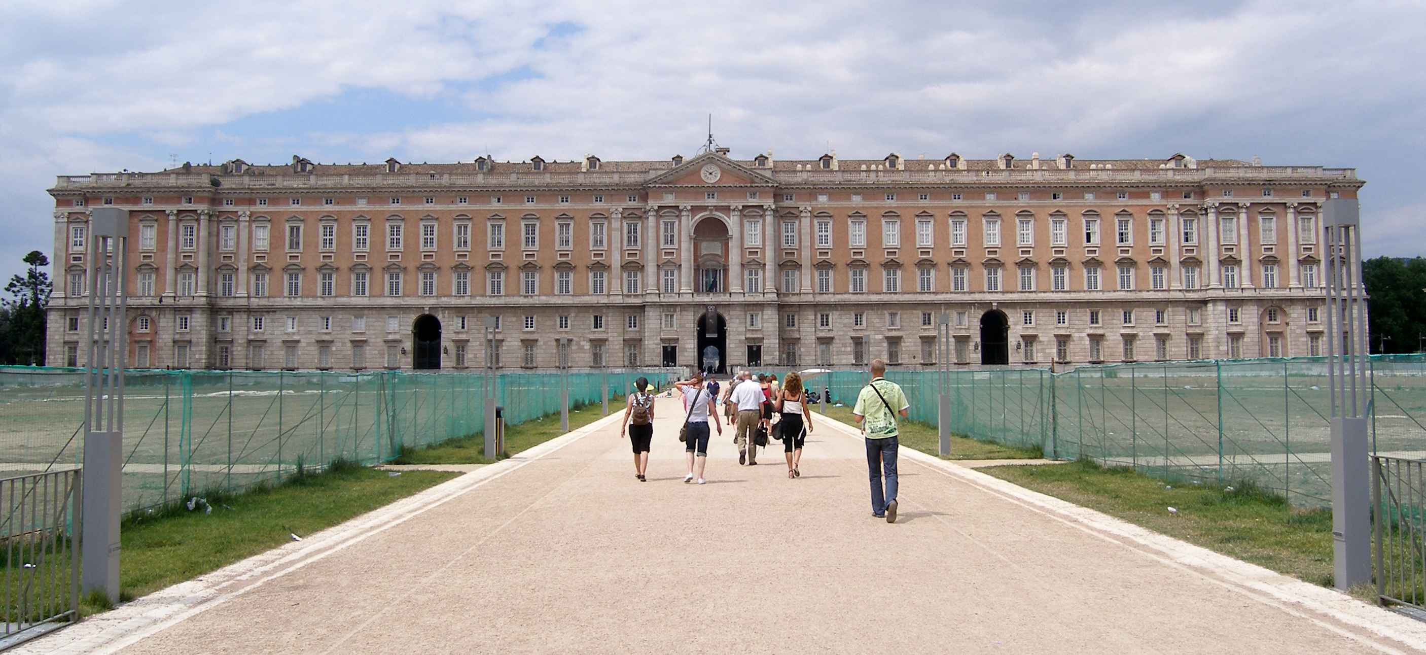 Vooraanzijde Paleis Caserta